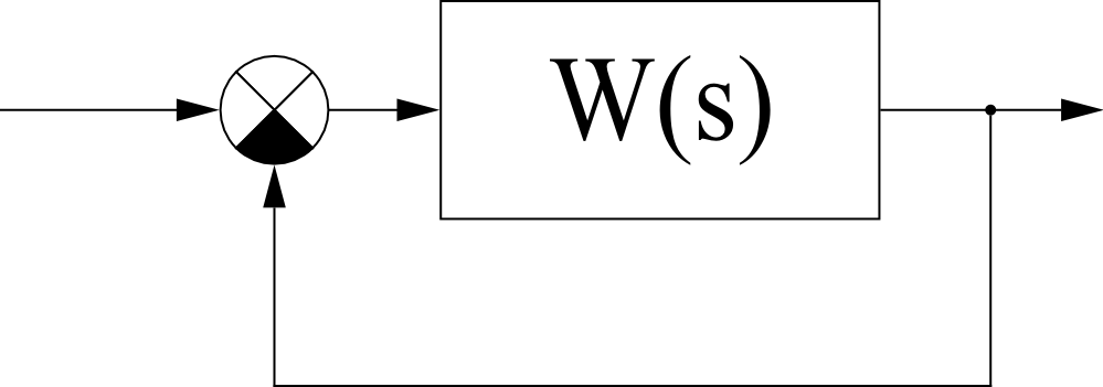 Схема замкнутой САУ при передаточной функции соответствующей ей разомкнутой САУ W(s).